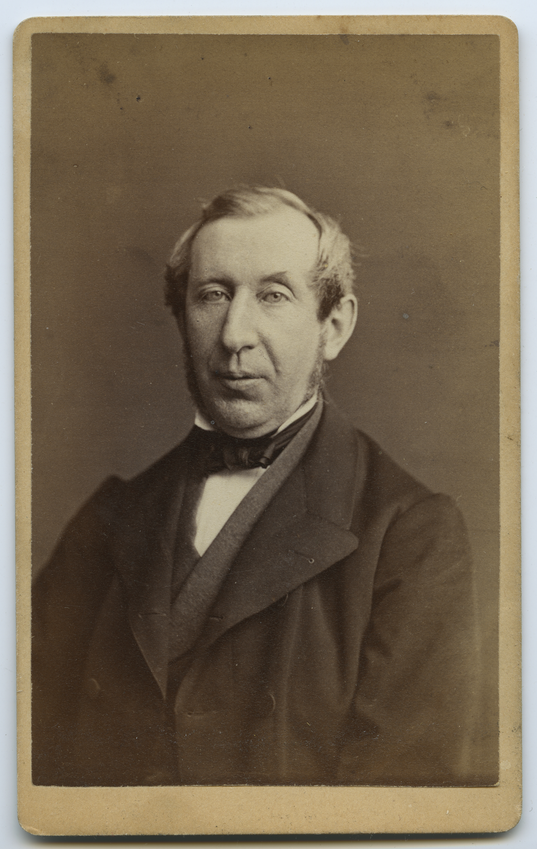 Bildet er hentet fra Arkivverket. Portrett av Hilmar Martinius Strøm, sorenskriver i Karmsund 1869 - 1891. Arkivinstitusjon : Statsarkivet i Stavanger Arkivnavn : Prominente personer i Stavanger Amt Sted : Norge, Rogaland, Stavanger, Ukjent Emneord: "Byfogder, Magistrater, Stortingsrepresentanter, Ordensvesen", Portretter, Menn Avbildet: Strøm, Hilmar Martinius